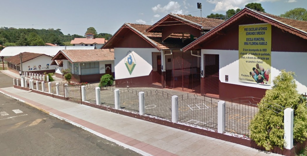 EMEF Irma Filomena Rabelo